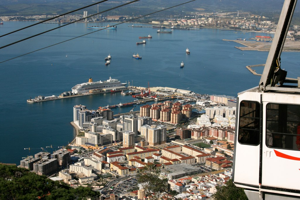 Cable Car Gibraltar